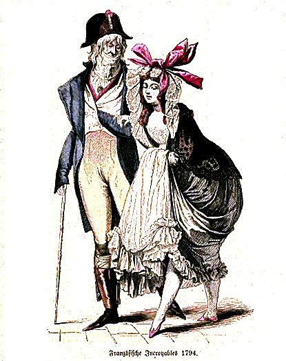 Incroyables. Källa: [1].